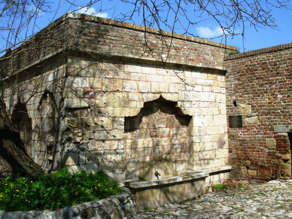 Česma Mehmed Paše Sokolovića na Kalimegdanu iz 1578 godine. Lokacija pored defterdarove kapije, Beograd. Snimio Goldfinger